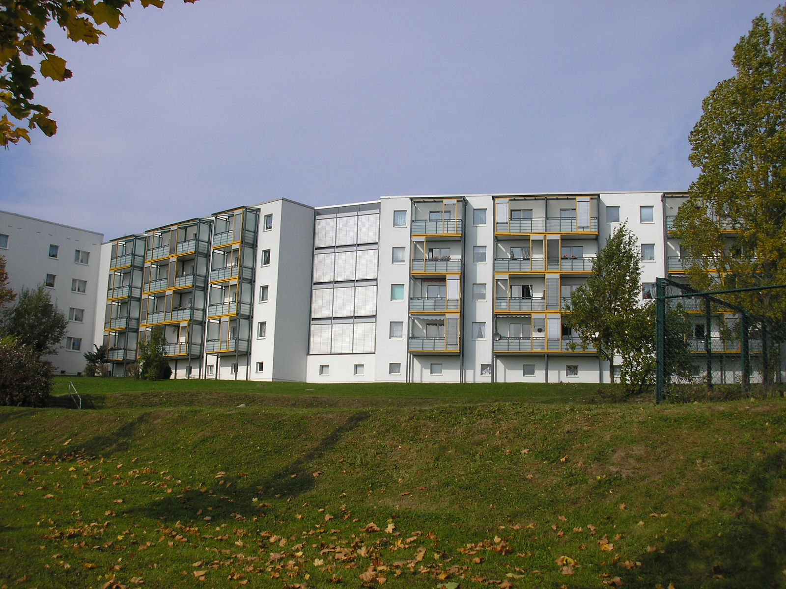 Nach dem Stadtumbaukonzept sanierter DDR-Wohnblock auf der Ilmenauer Pörlitzer Höhe. Durch Rückbau auf 4 Etagen und Abriss jeder zweiten Block-Reihe soll das Gebiet attraktiver werden und der Leerstand bekämpft werden.